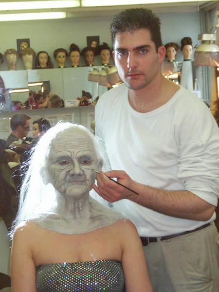 Dubi Preger, Make-up artist, Israel.